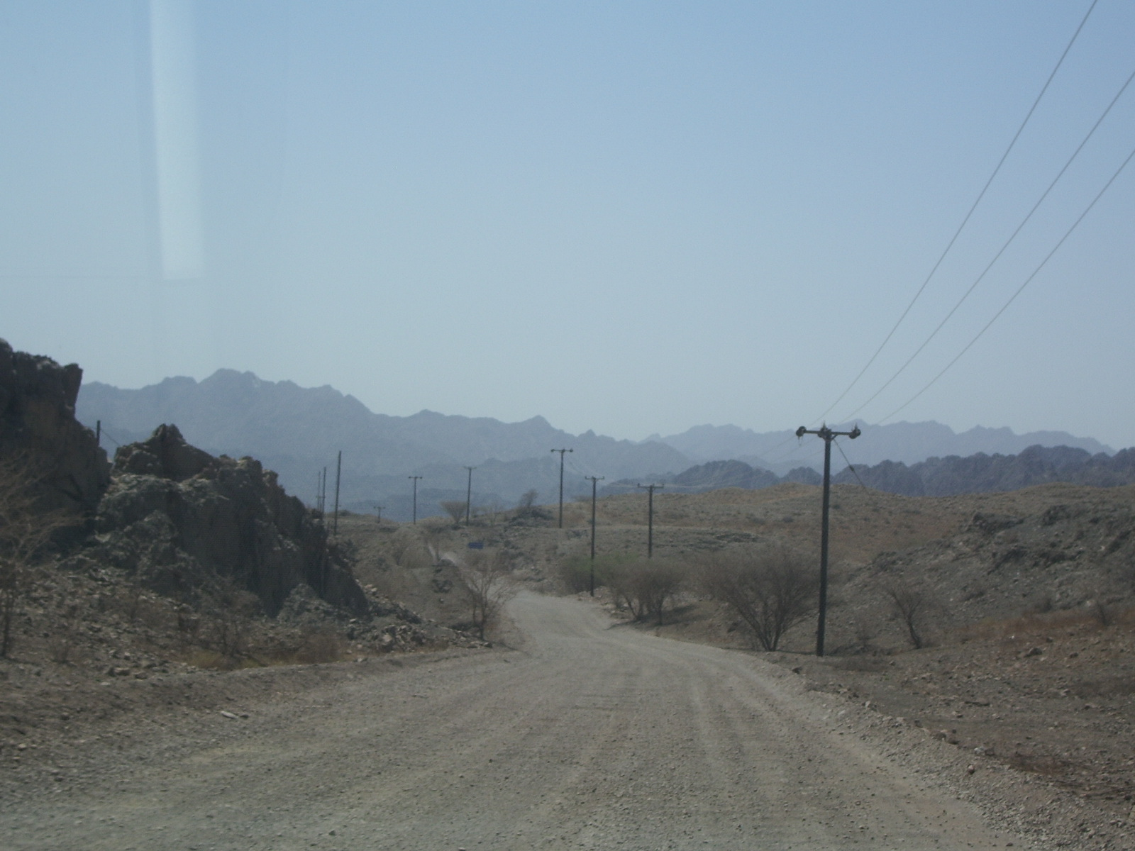 Hatta mountains in UAE